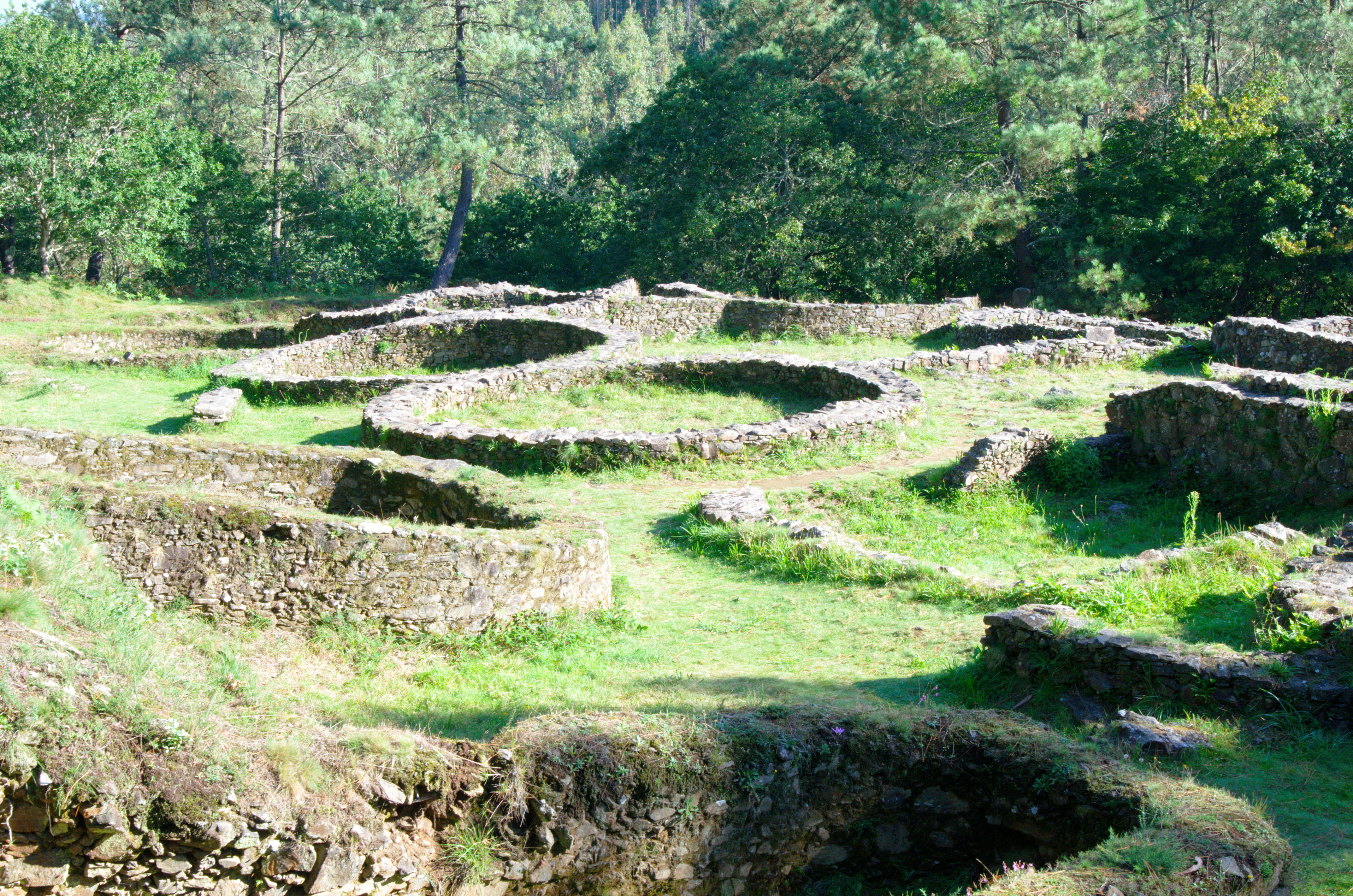 En el Interior del Castro de Borneiro